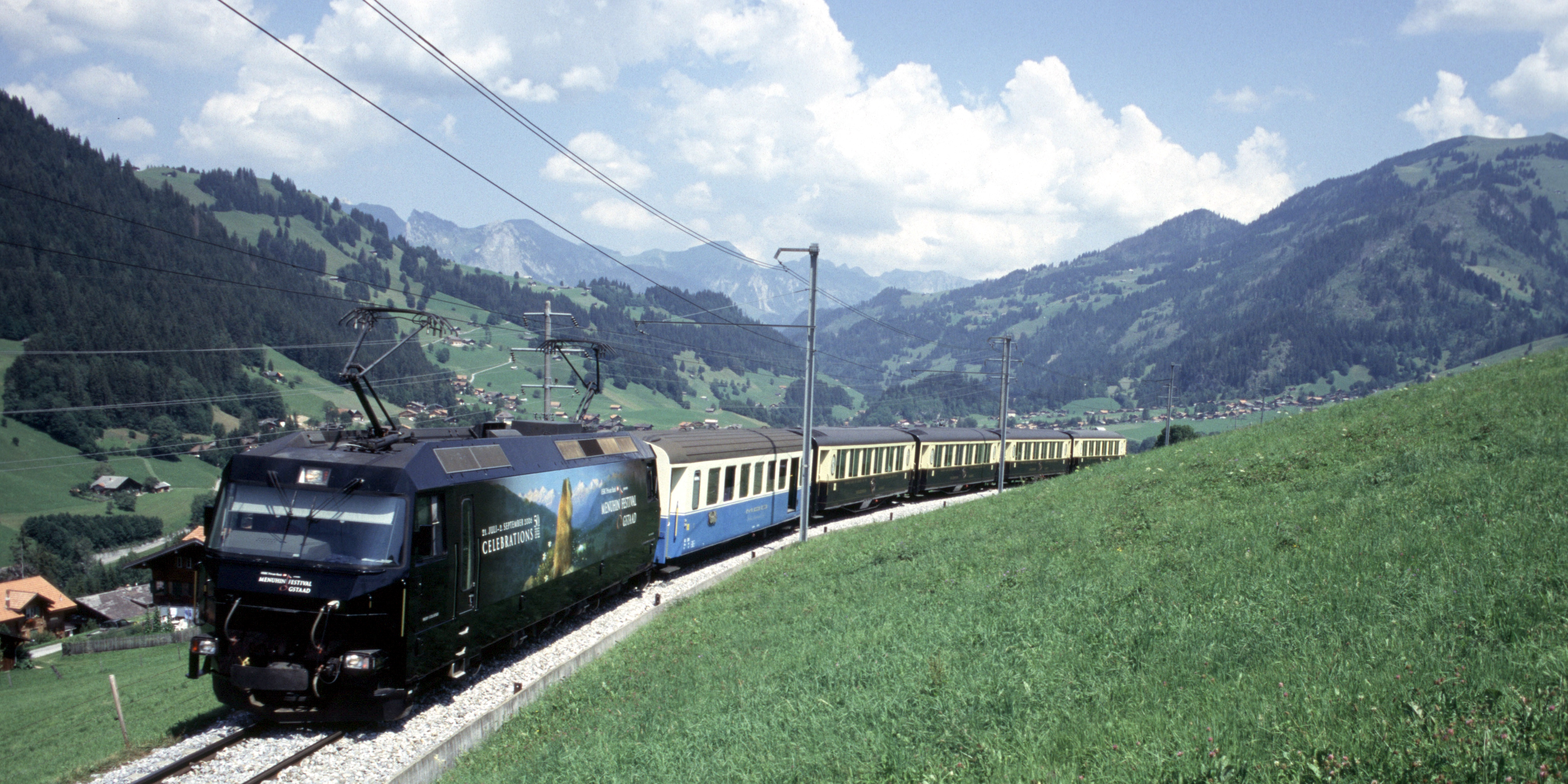 Ge 4/4 MOB Train near Zweisimmen